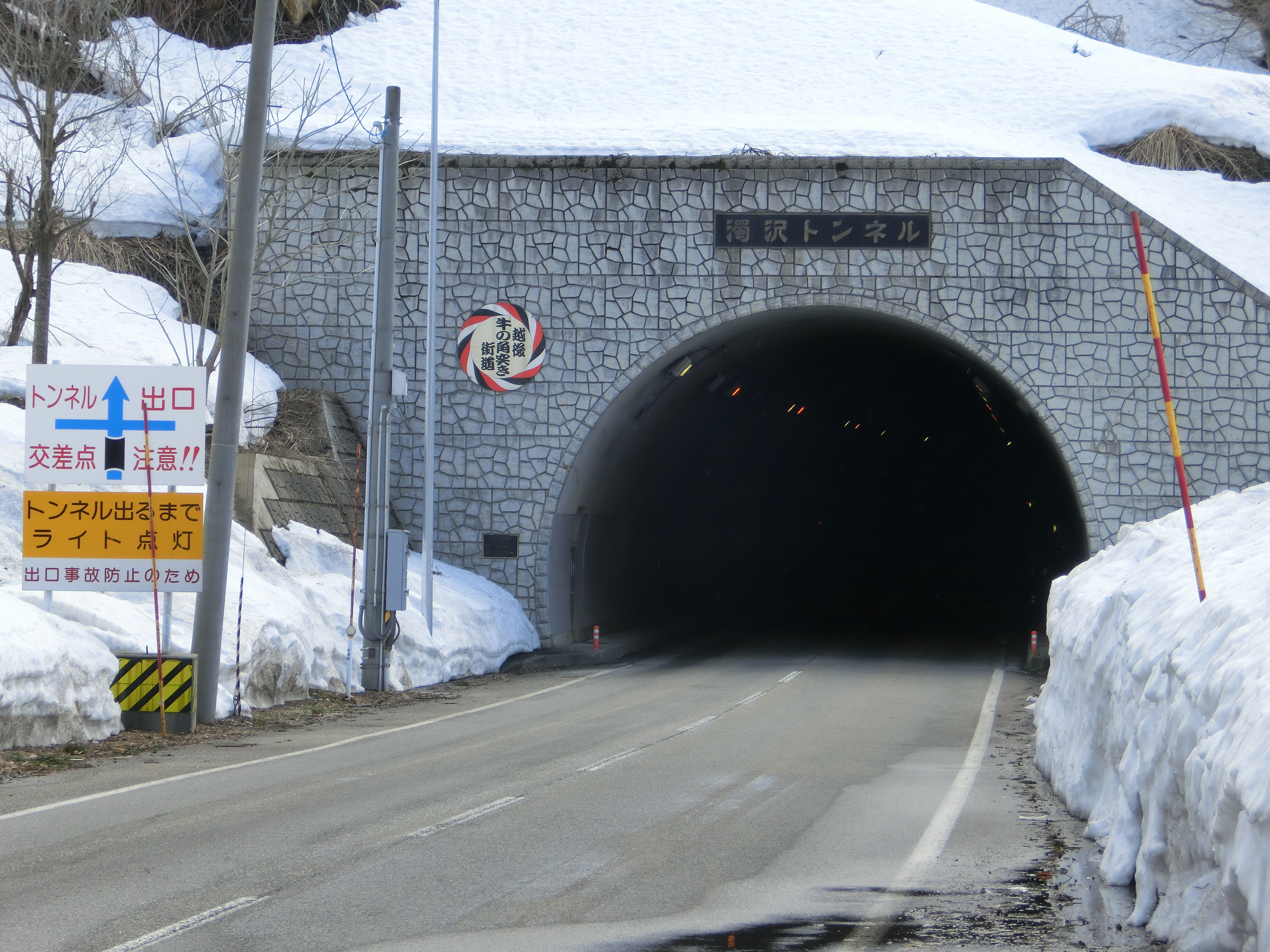 この画像は2018年3月12日投稿者によって、新潟県長岡市濁沢町にて撮影された、新潟県道23号柏崎高浜堀之内線濁沢バイパスの濁沢トンネル入口の写真。 Casio Exilim EX-ZR200